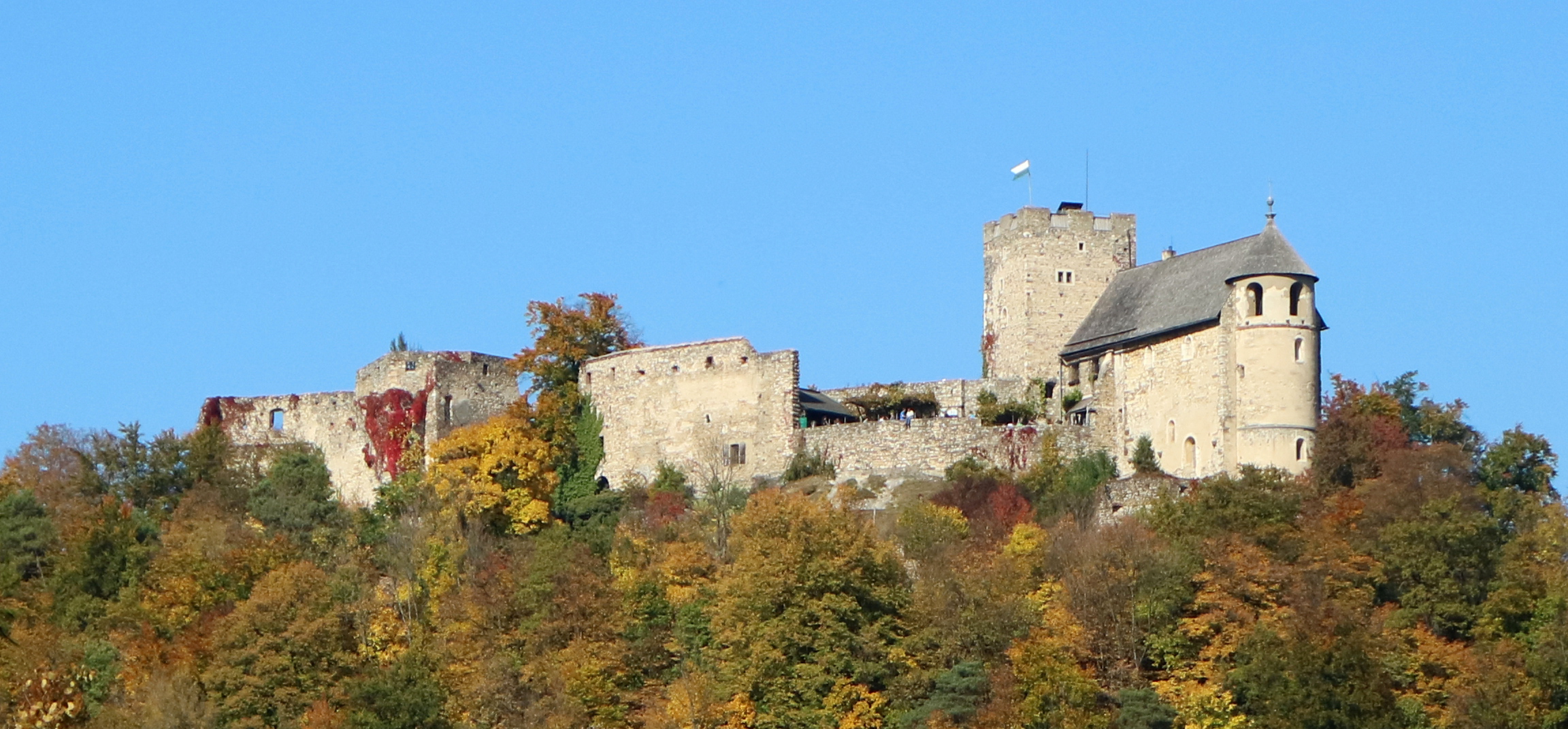 Blick vom Nordhang des Plabutsch zur Burgruine Gösting, Graz